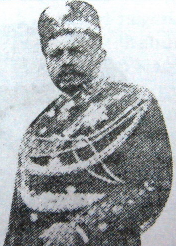 Dato' Muhammad Ibrahim Munsyi.